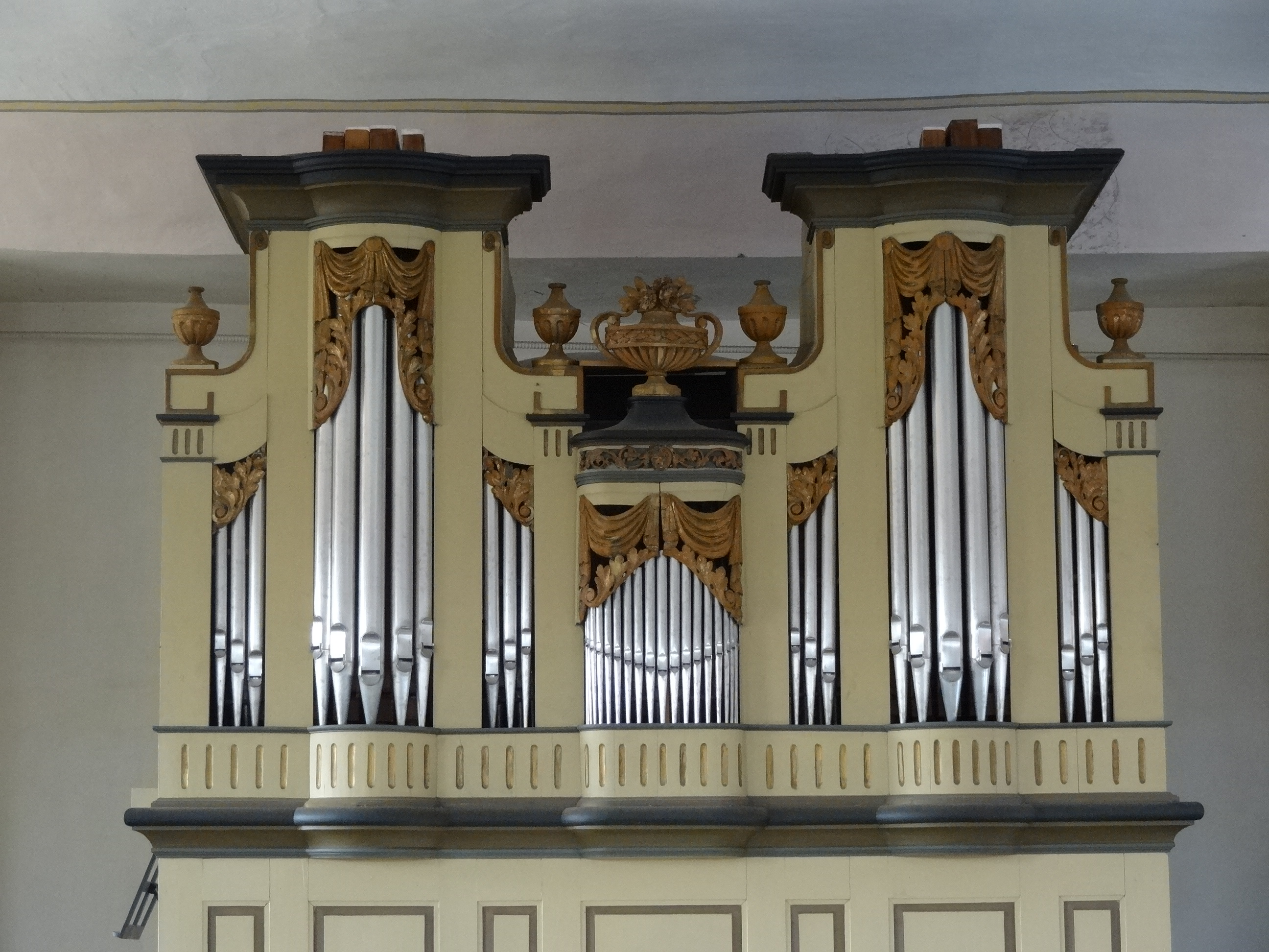 Evangelische Kirche Birklar